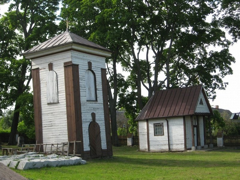 Паланечка. Драўляны касцёл